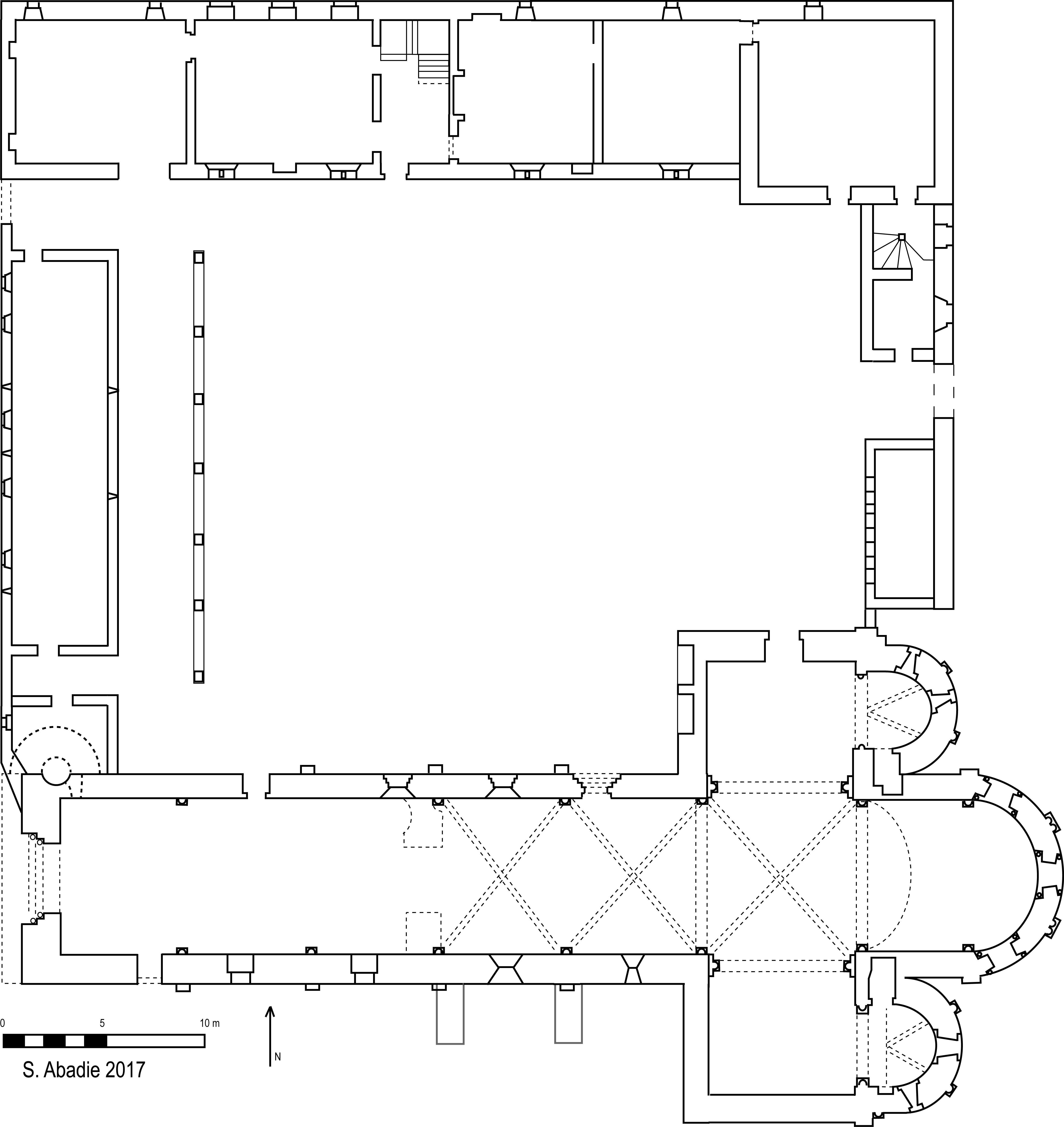 Plan général de l'abbaye Notre-Dame d'Arthous